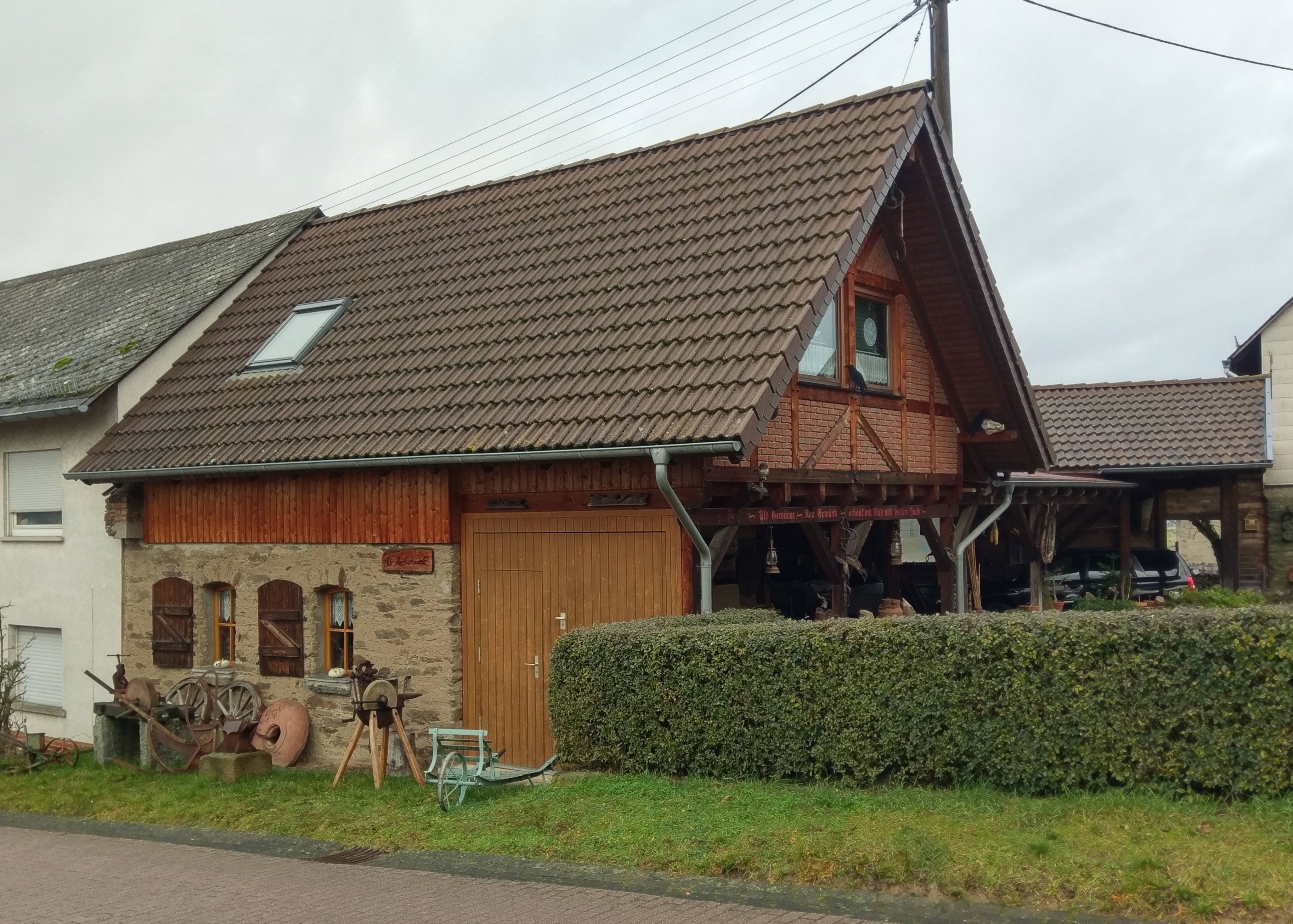 Alte Dorfschmiede in Dörscheid im Rhein-Lahn-Kreis in Rheinland-Pfalz.